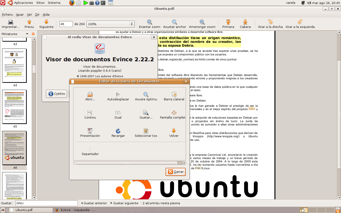 Captura de semeya d'Evince, version n'asturianu